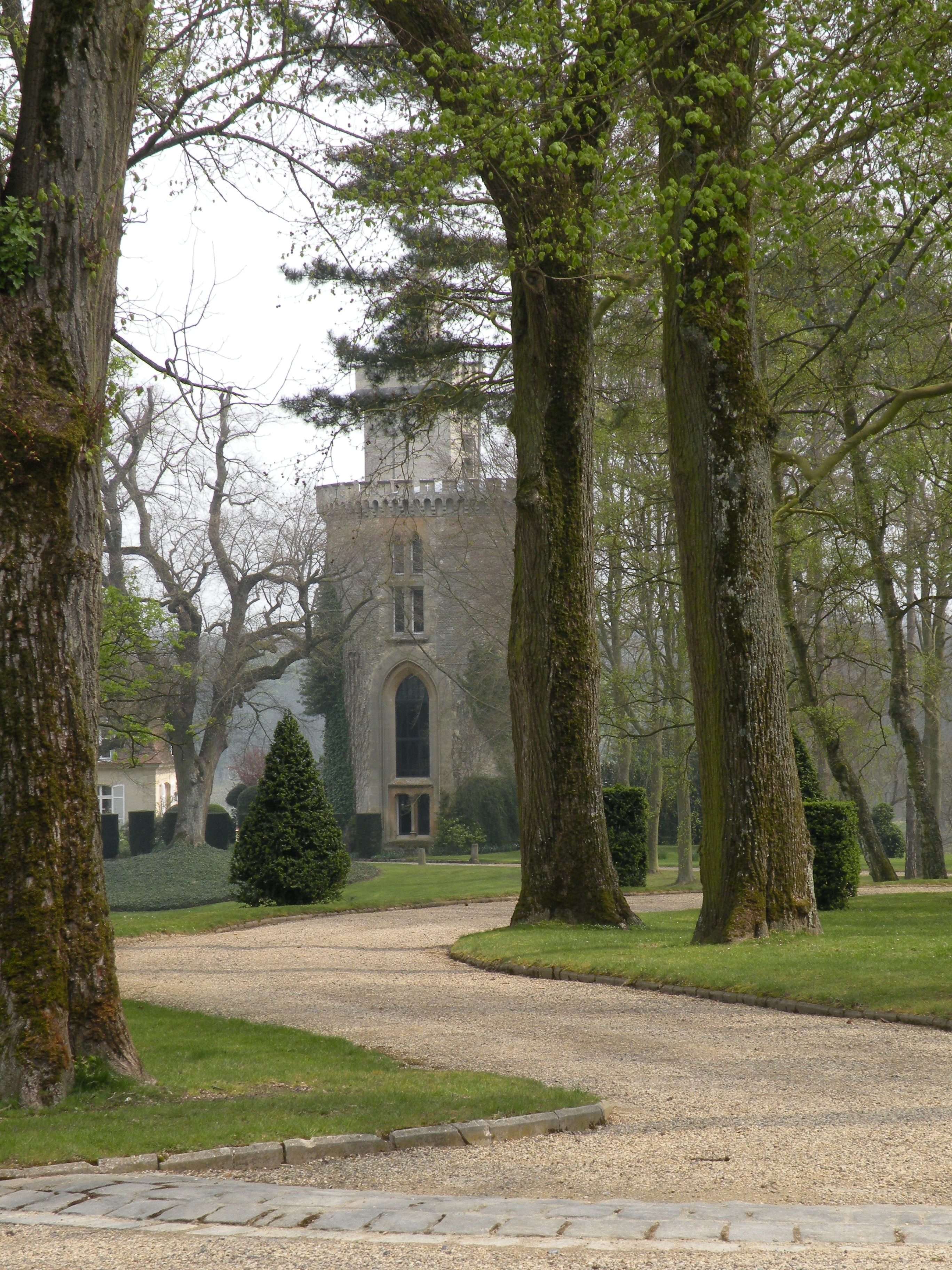 tour du chateau